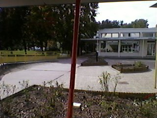 Lycée en forêt, Montargis, Loiret, Centre, France